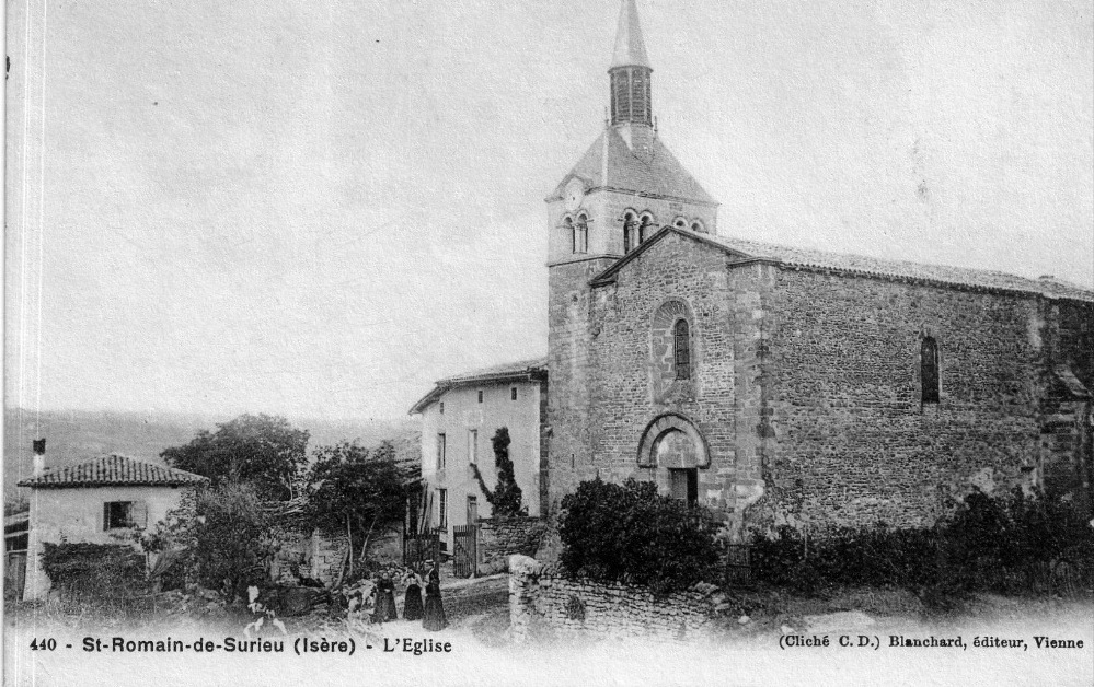 Saint-Romain-de-Surieu (Isère) - l'église.